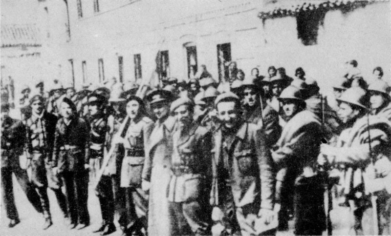 Brygada im. Jarosława Dąbrowskiego po bitwie pod Gudalajara